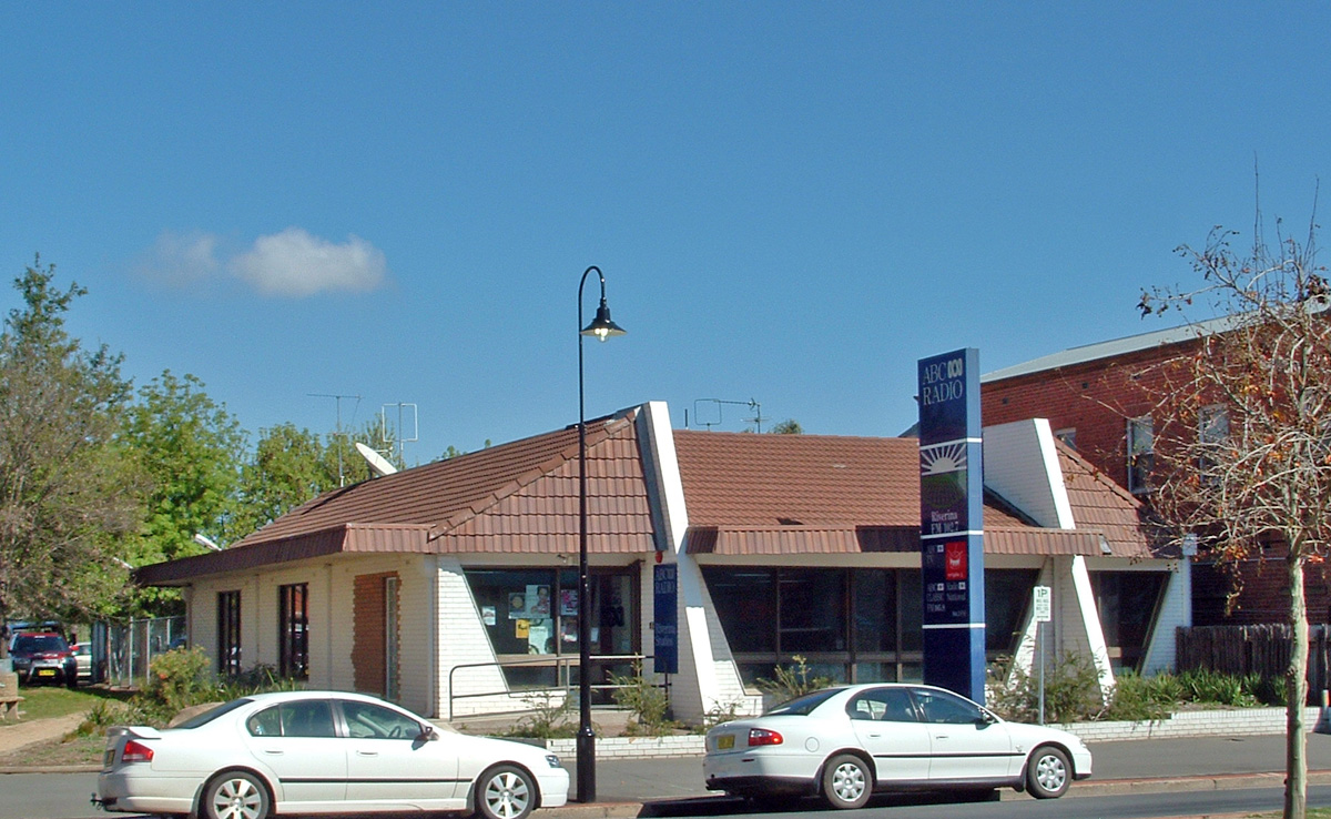 ABC Riverina, Wagga Wagga